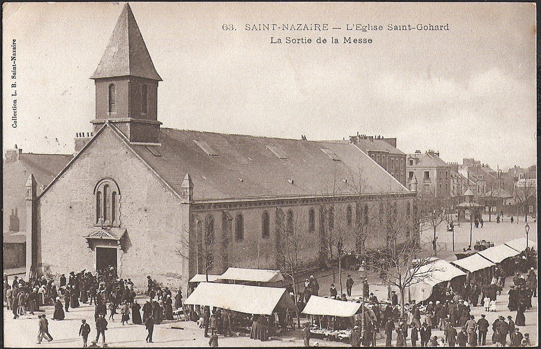 Sortie de messe à Saint-Gohard vers 1905.